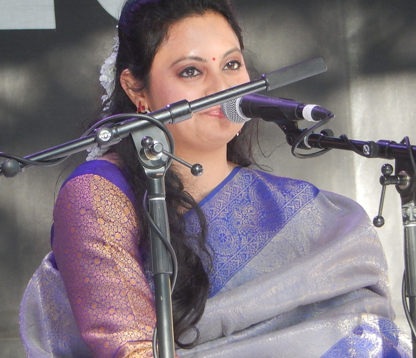 Meeta Pandit